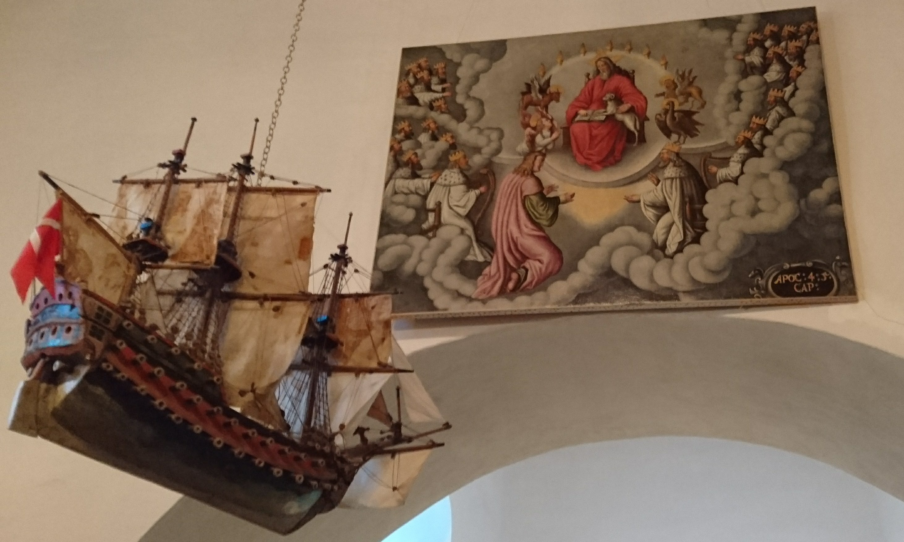 Deler av interiøret i Gildeksål gamle kirke